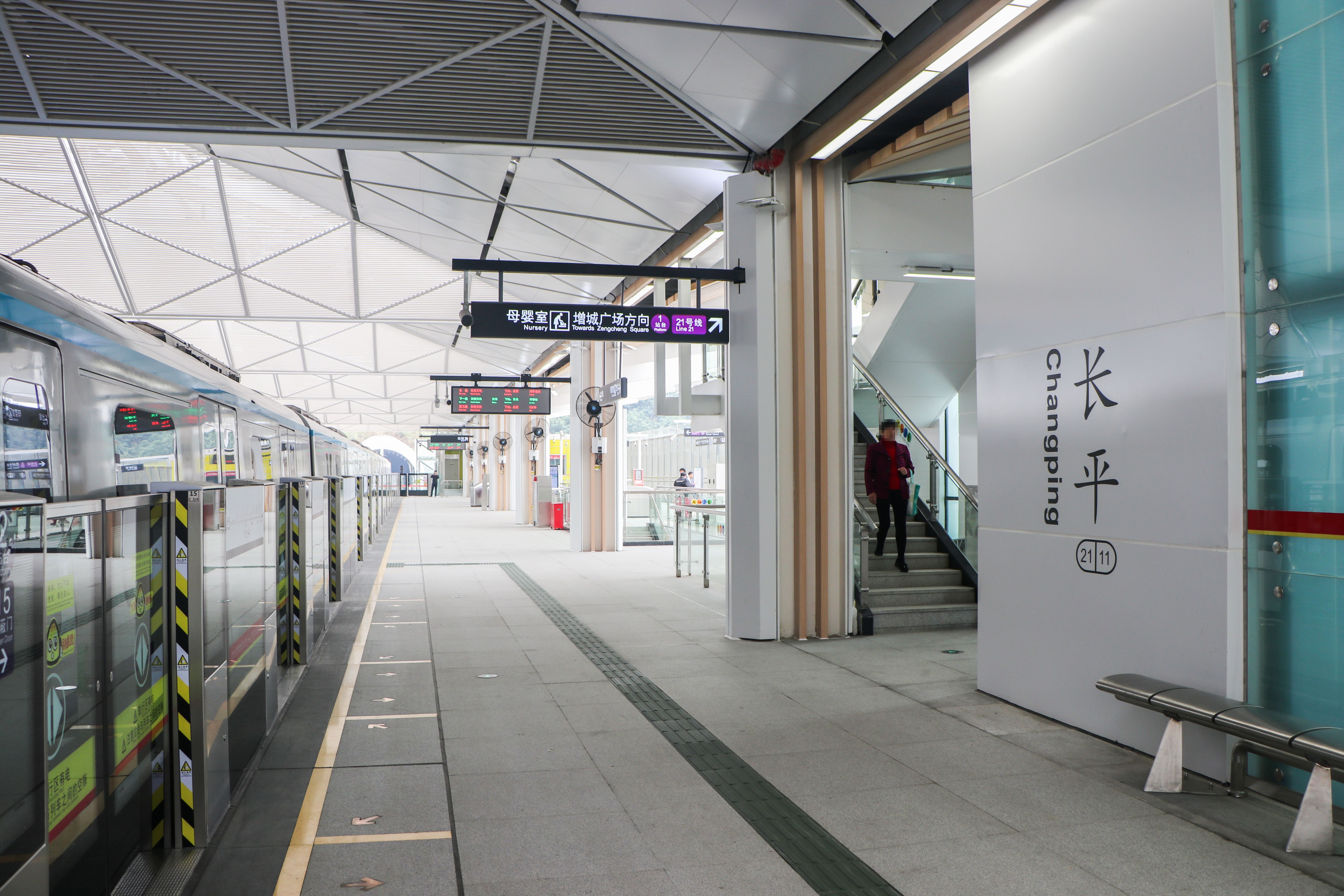 广州地铁长平站